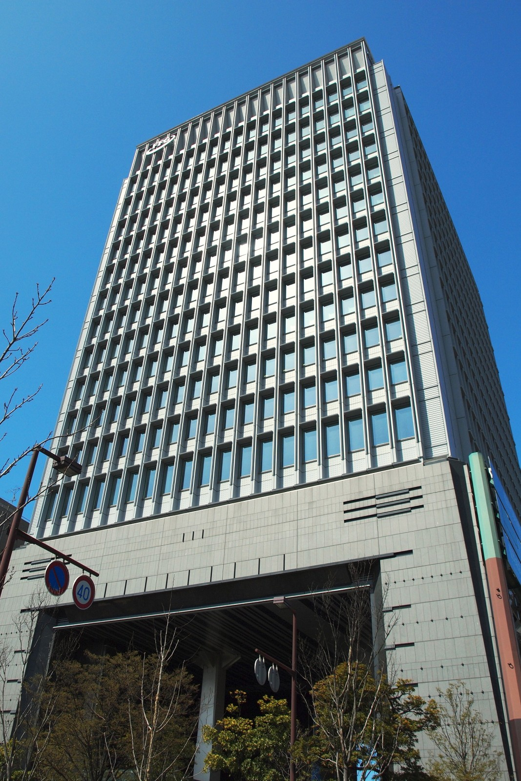 福岡市中央区大手門のふくおかフィナンシャルグループ本社ビル。